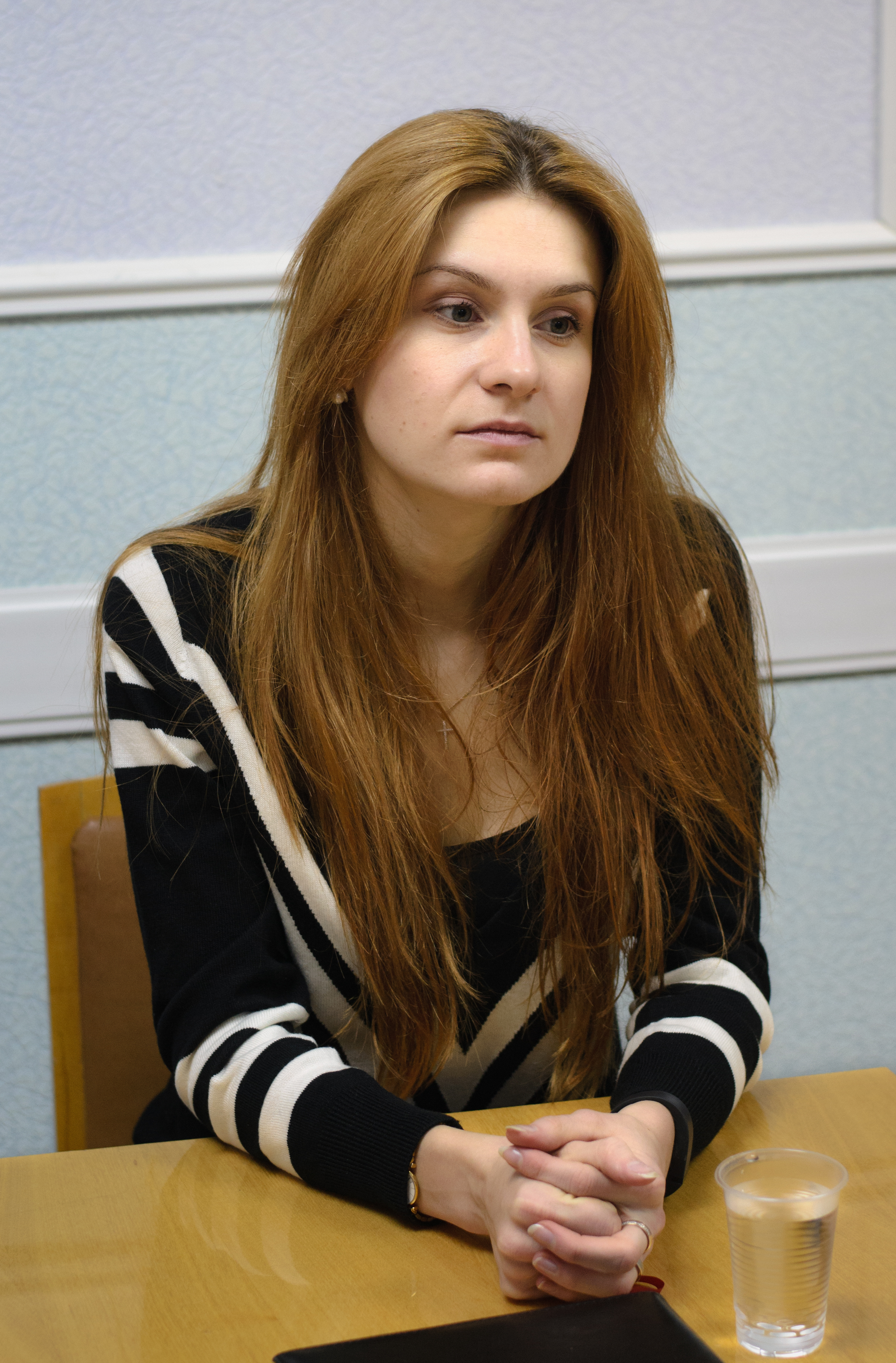 Maria Butina